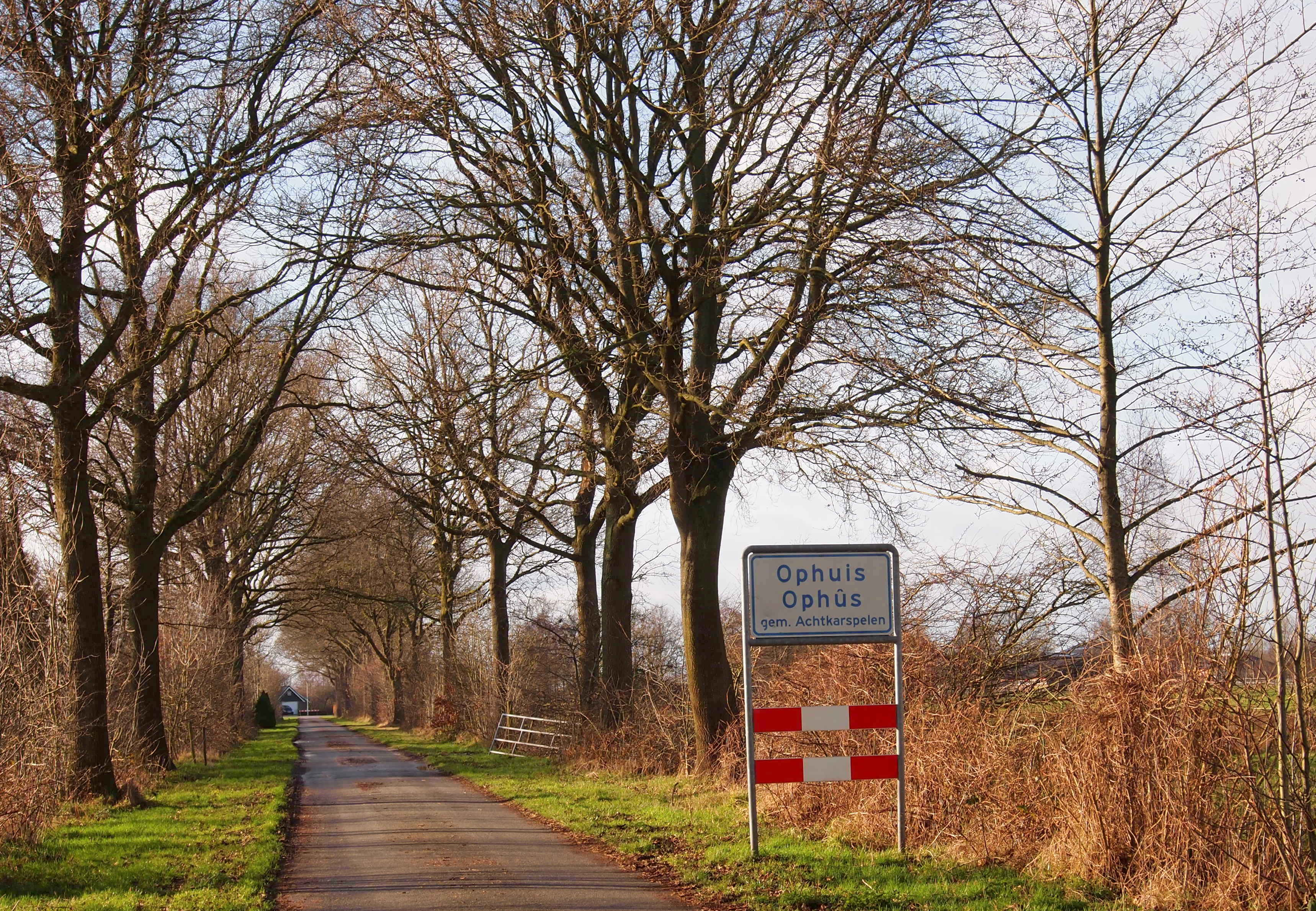 Ophuis